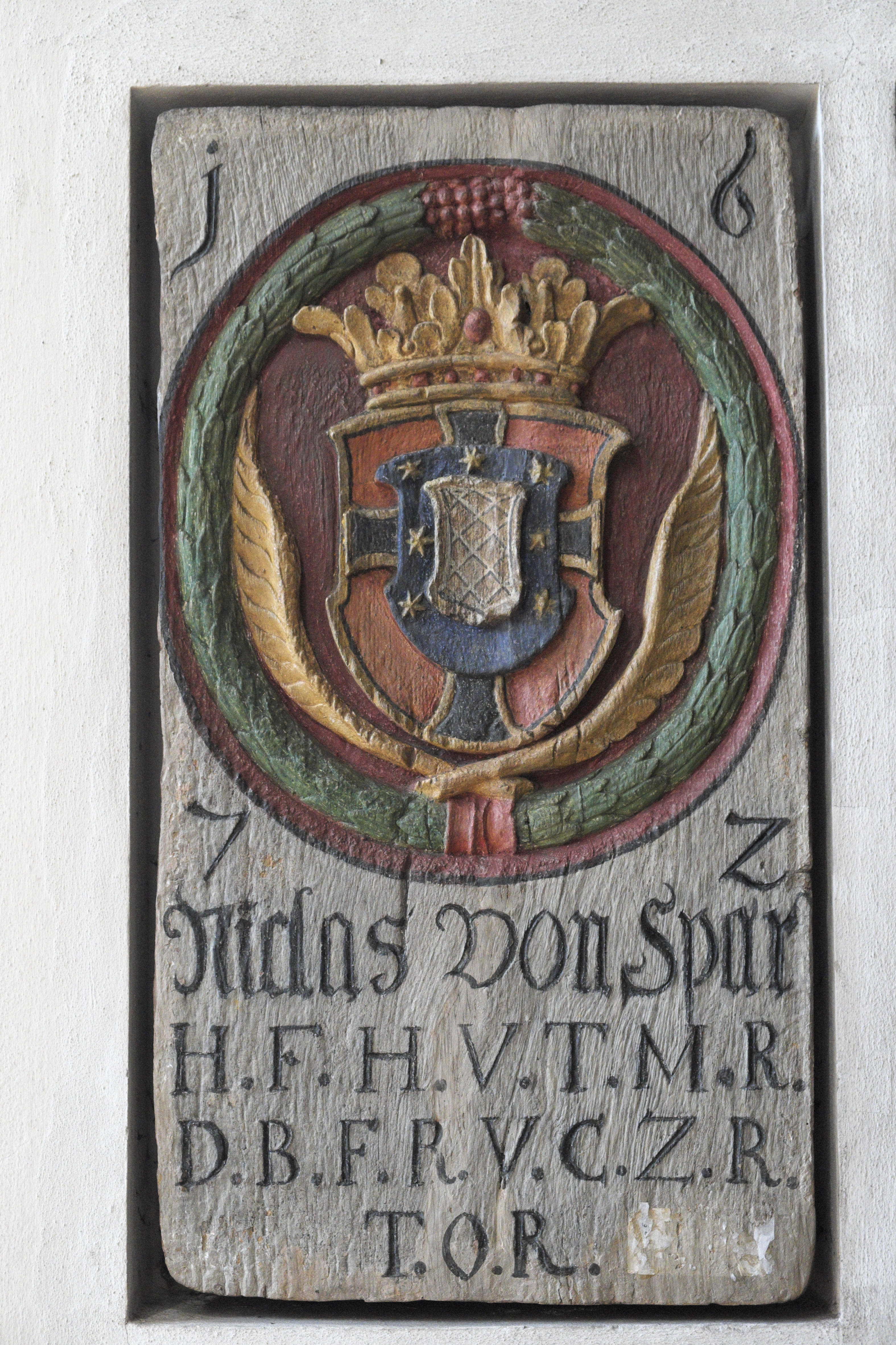 Wallfahrtskirche Maria Birnbaum in Sielenbach im Landkreis Aichach-Friedberg (Bayern), Wappentafel des Deutschordensritters Niclas von Spar (Nikolaus von Sparr), mit der Jahreszahl 1672